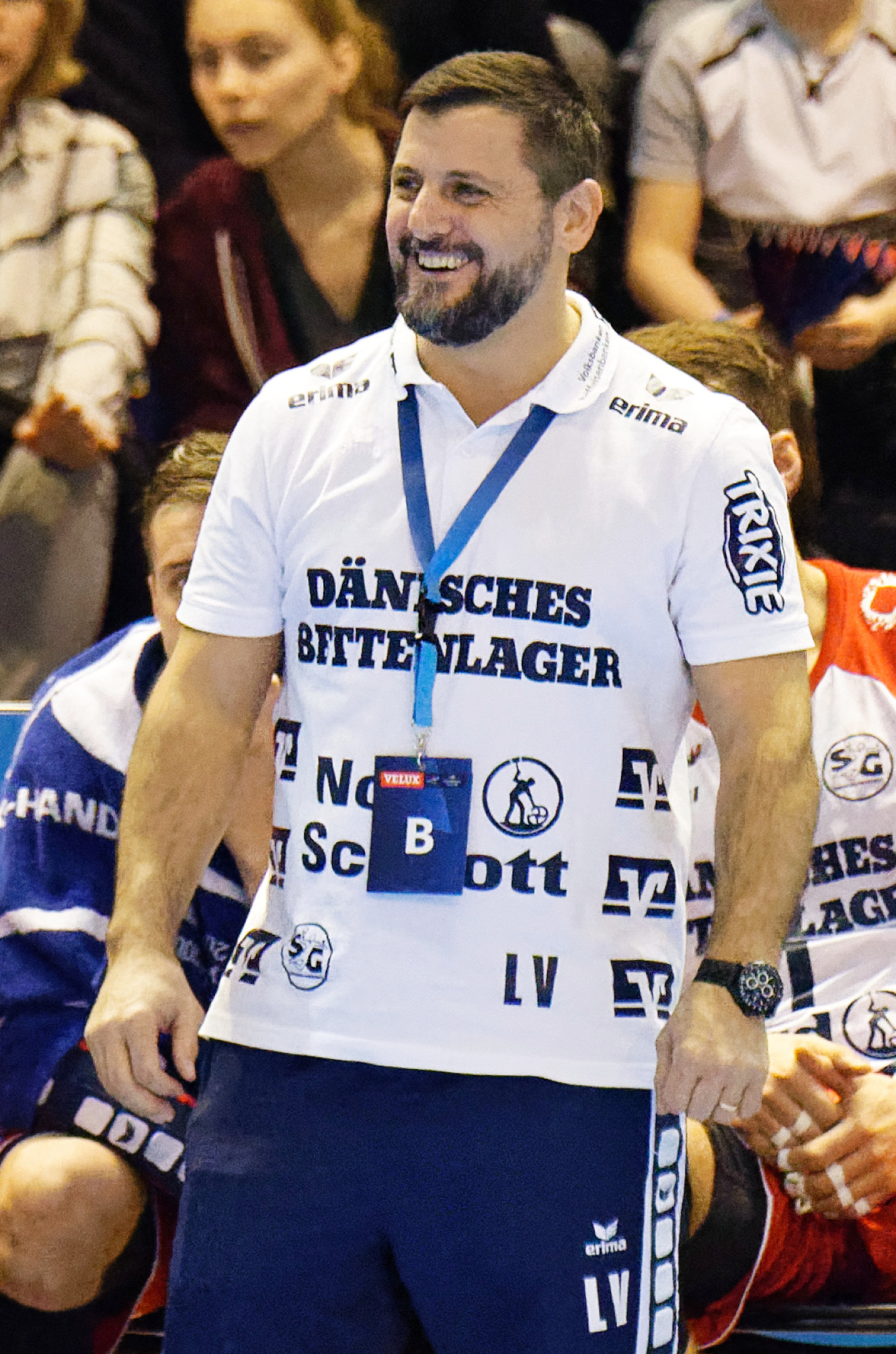 Rencontre de phase de groupe de la Ligue des Champions 2015-16 entre le PSG et SG Flensburg. A la Halle Carpentier (Paris), le 7 mars 2016.